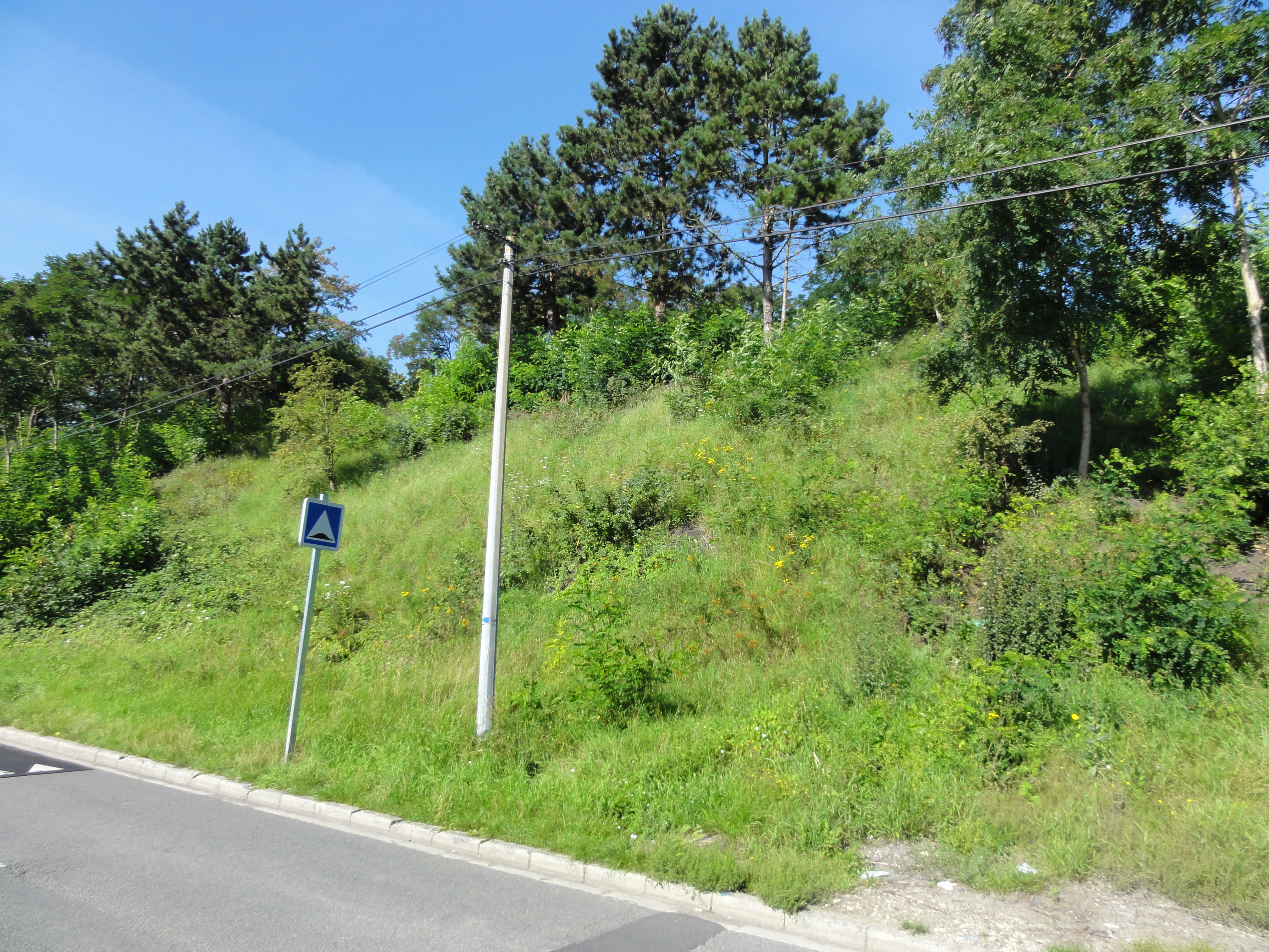 Terril n° 156 dit Turenne, Fosse Turenne de la Compagnie des mines d'Anzin, Denain, Nord, Nord-Pas-de-Calais, France.